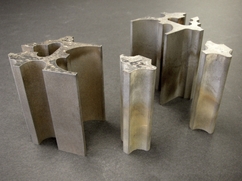 75mm dik staal gesneden met een abrasief waterstraalsnijmachine